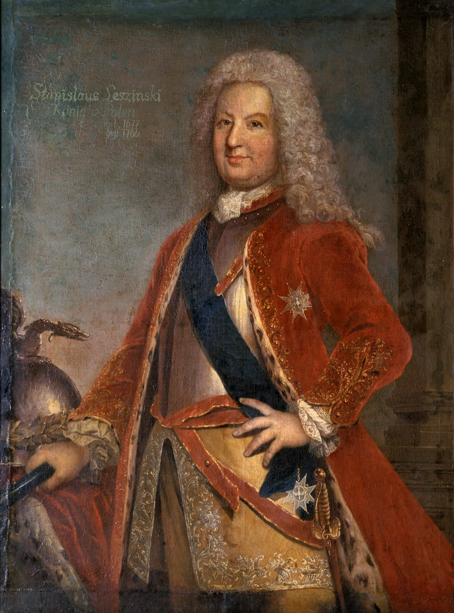 Portrait of Stanislaus I Leszczyński (1677-1766)